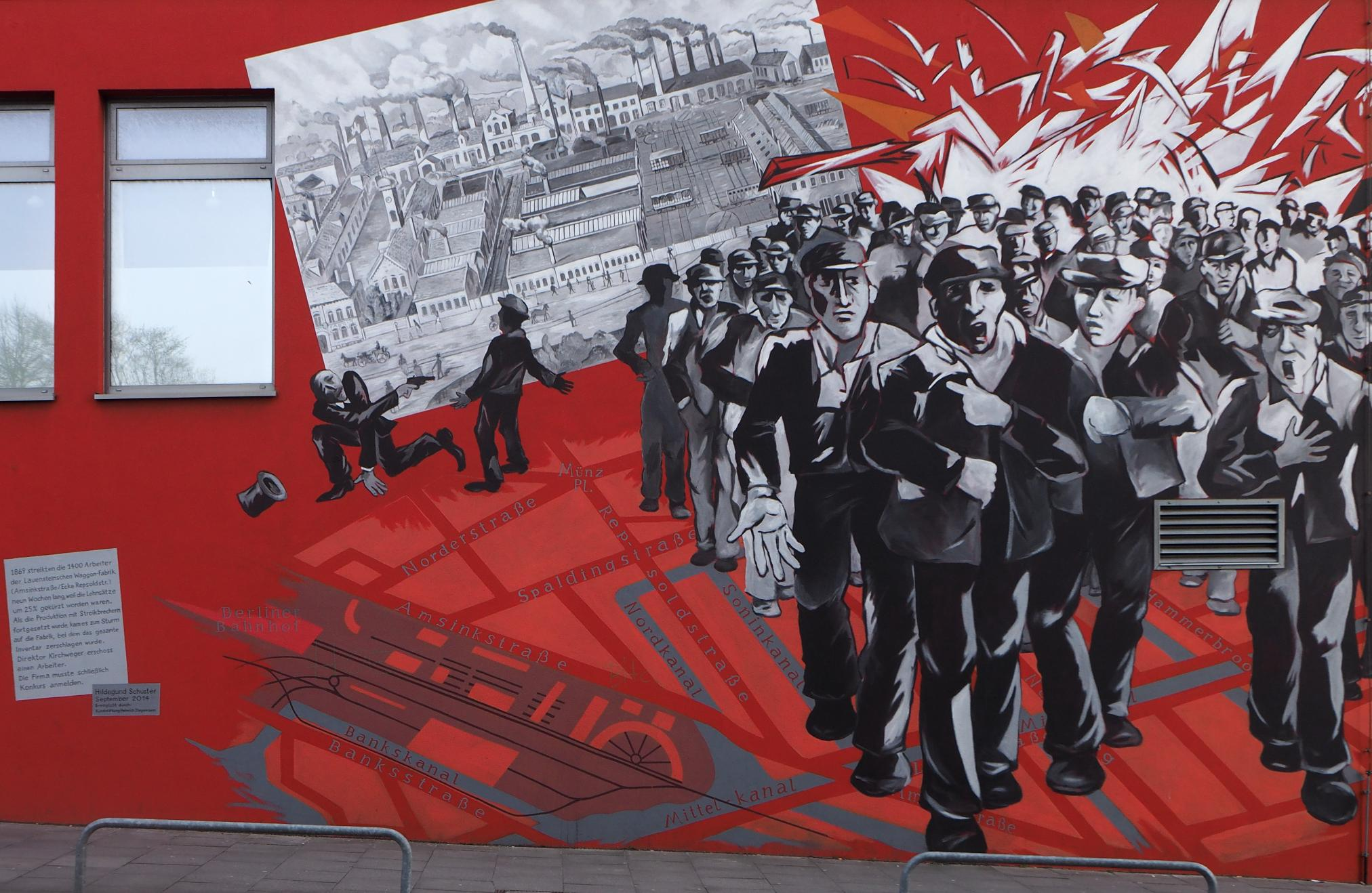 Hamburg, Besenbinderhof , Gewerkschaftshaus, Wandbild von H. Schuster, Foto: März 2017